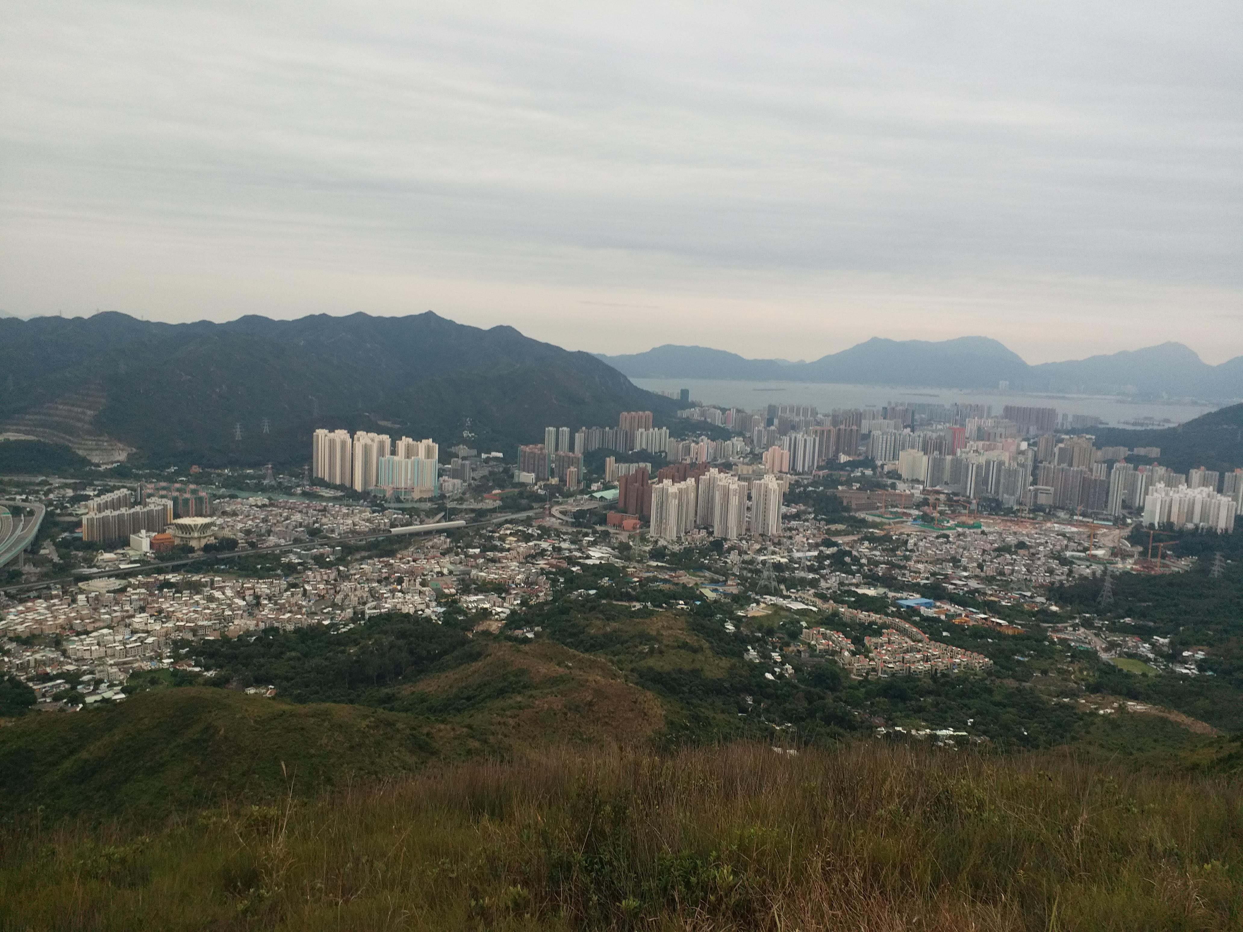 從圓頭山遠眺九逕山